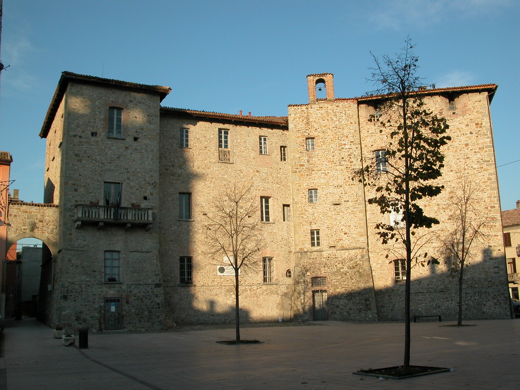 Foto mia personale, sede del comune di Pianello Valtidone, 2007